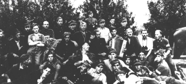 Oddział "Jędrusiów" - Okręg Radomsko-Kielecki Armii Krajowej.